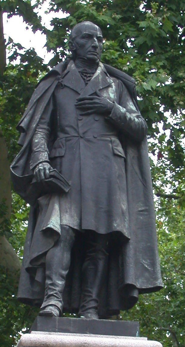 La statua per Domenico Rossetti a Trieste